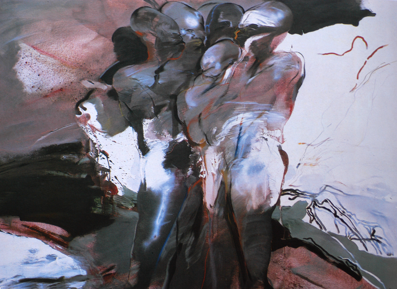 Franta, Setkání (1986), olej na plátně 200 x 260 cm